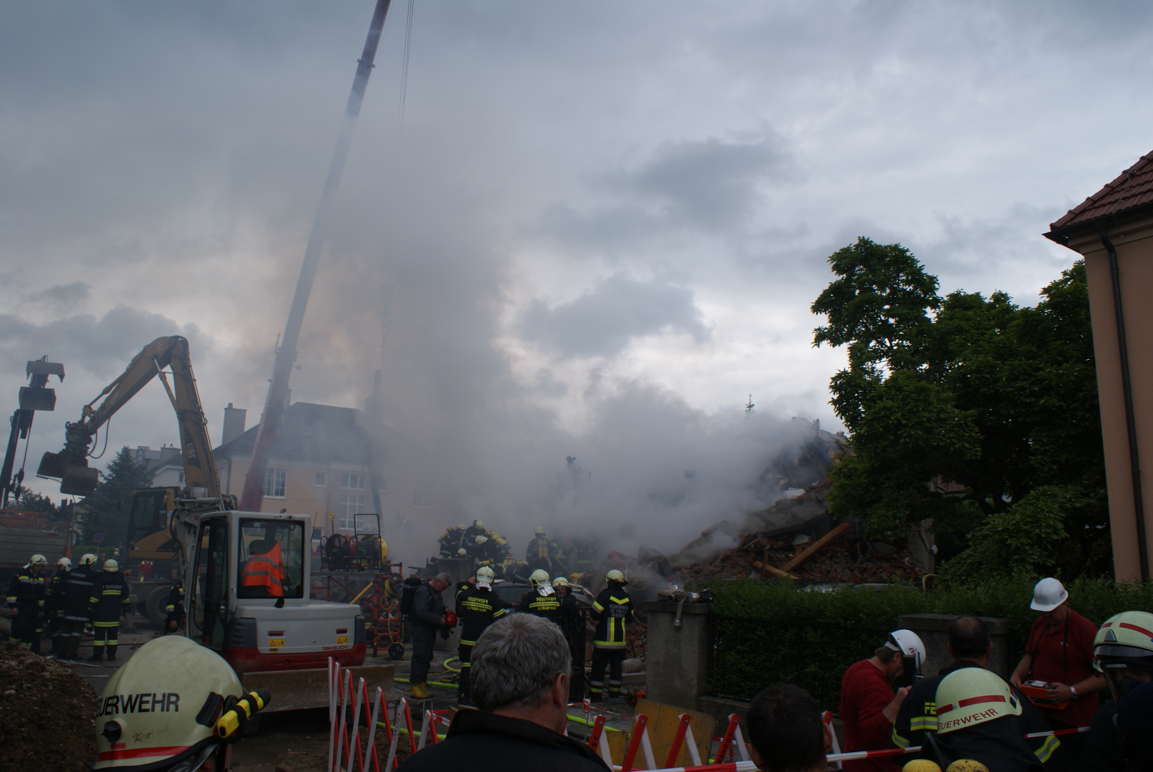 Bei den Löscharbeiten nach der Gasexplosion in St. Pölten